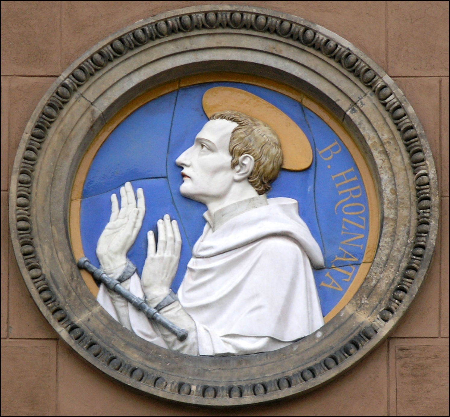 Kostel svatého Václava (Smíchov) - detail